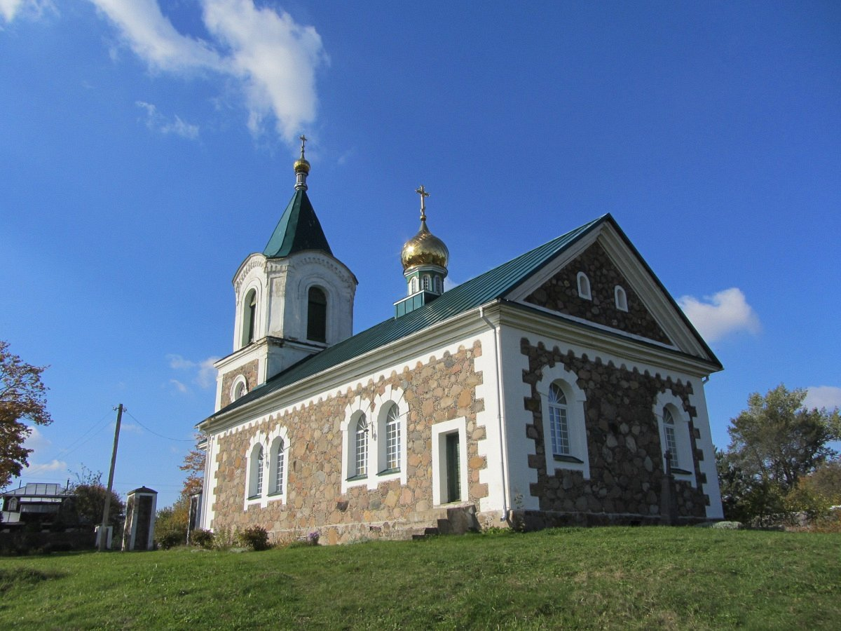 Лоск. Царква